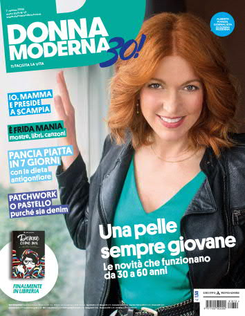 Copertina della rivista Donna Moderna, numero dei 30 anni del periodico, 7 marzo 2018, Arnoldo Mondadori Editore.